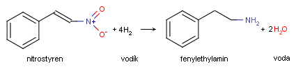 Reakční schéma hydrogenace nitrostyrenu na fenylethylamin Autor: Antonín Vítek, email: avitek(at)lib(dot)cas(dot)cz